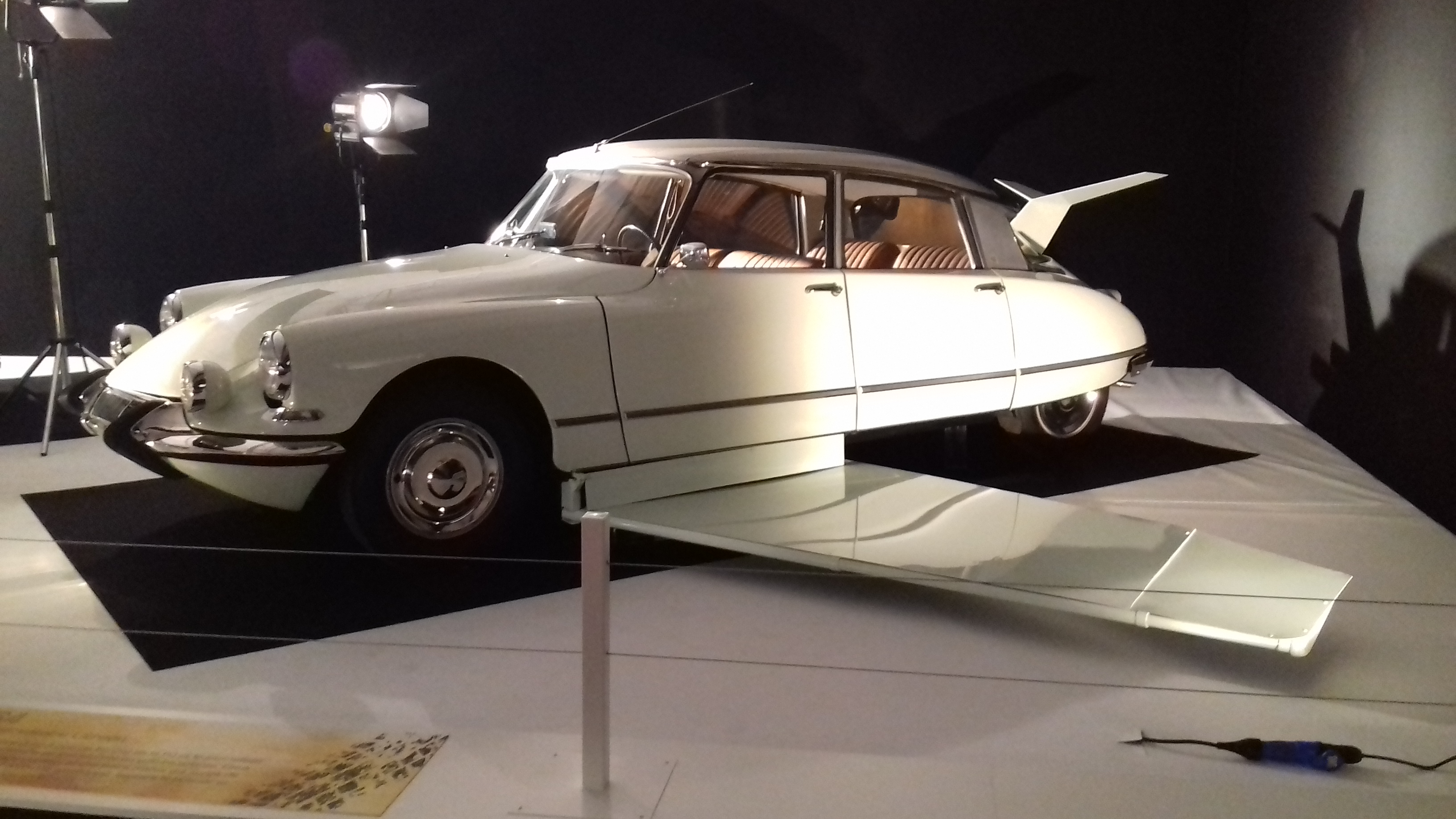 Citroën DS 19 (Fantômas se déchaîne) à l'exposition Moteur ! L'automobile fait son cinéma, au Mondial de Paris 2016